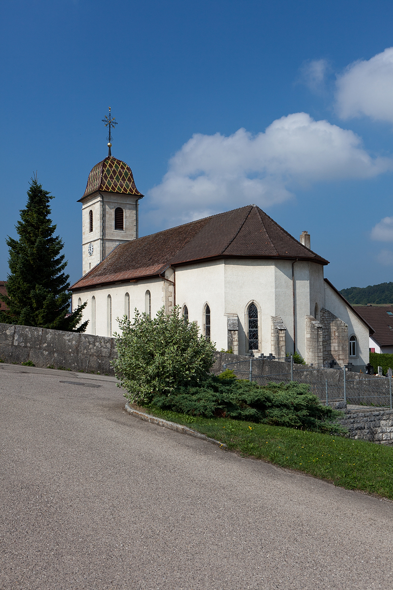 Eglise Saint-Maurice à Chenevez (Haute-Ajoie, JU)